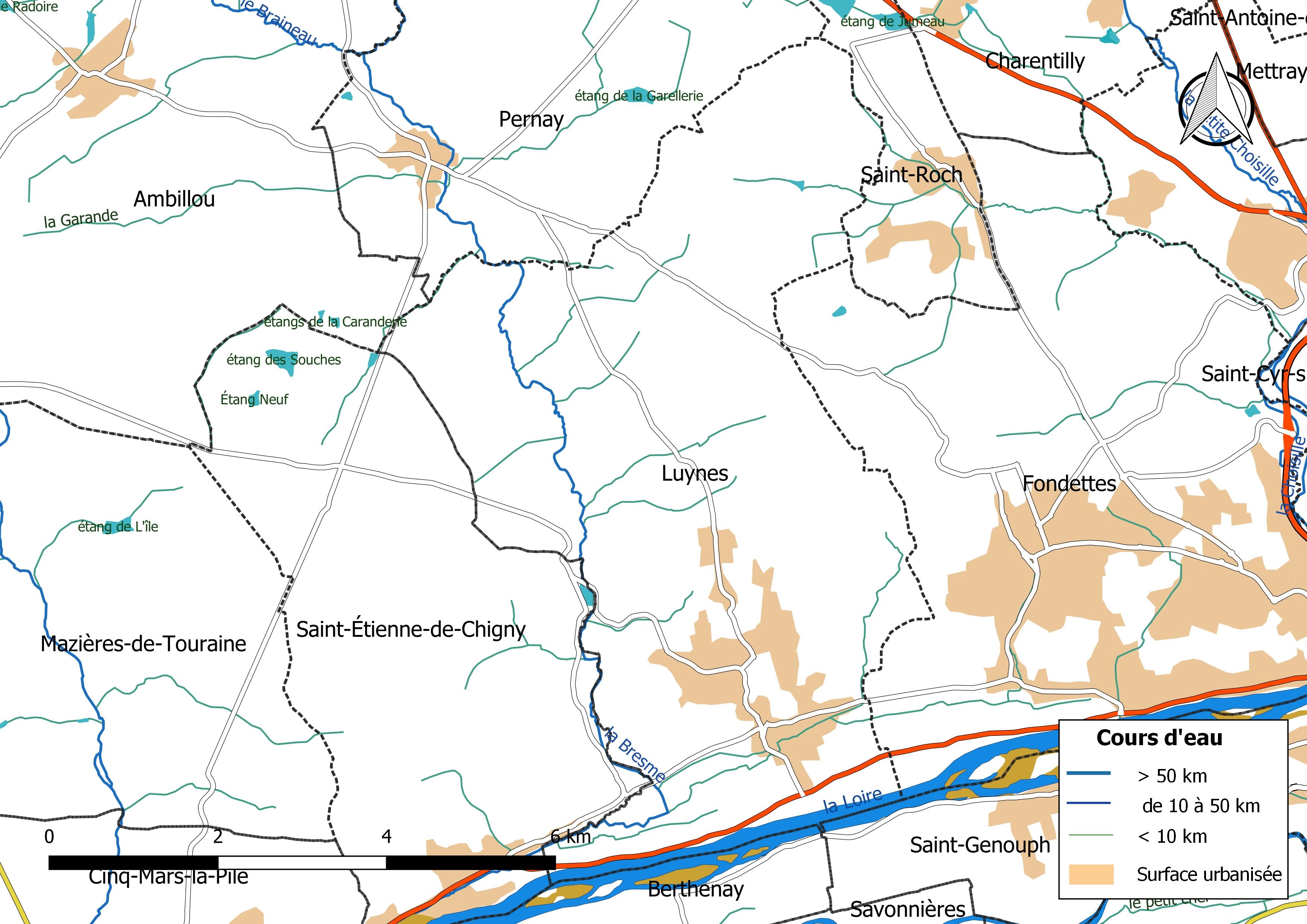 Carte du réseau hydrographique de la commune de Luynes (Indre-et-Loire (France).